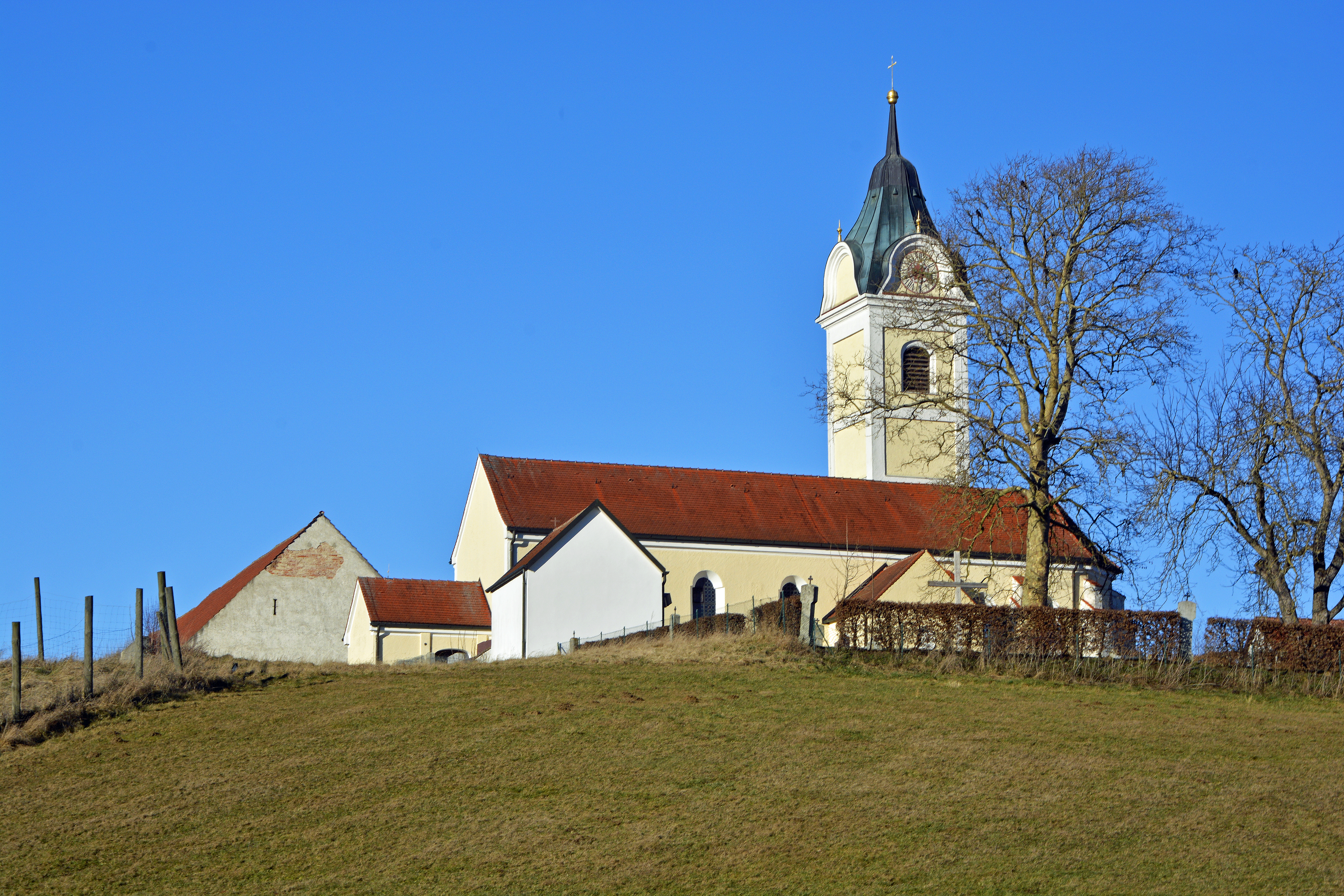 Ainhofen (Markt Indersdorf), Kirche St. Maria, Südseite